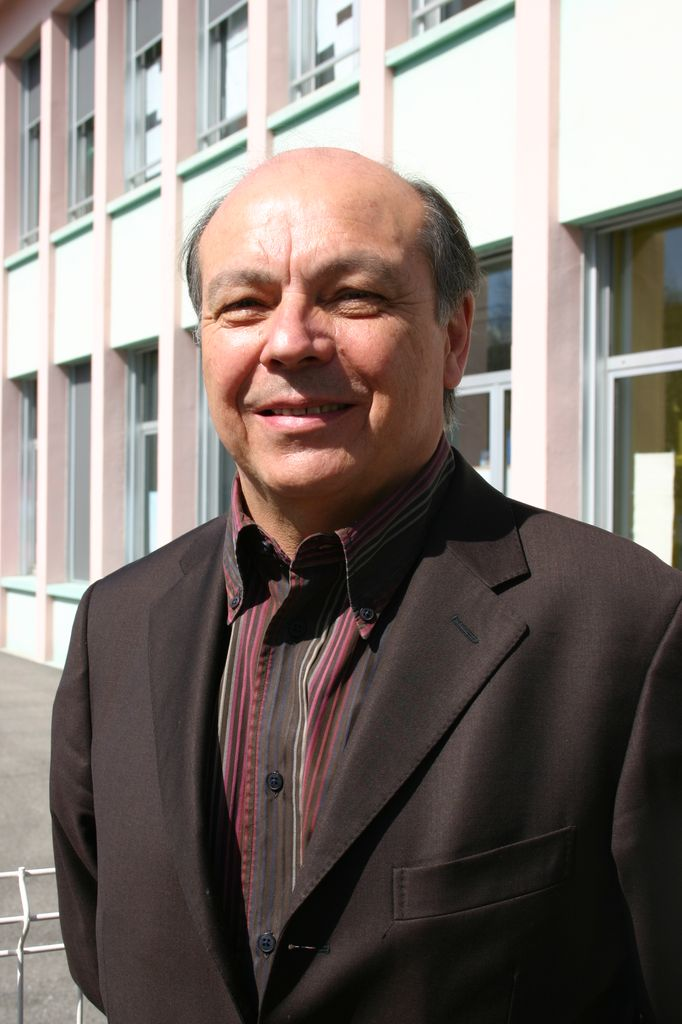 Christian Dupessey, maire d'Annemasse, mandant 2008 - ...